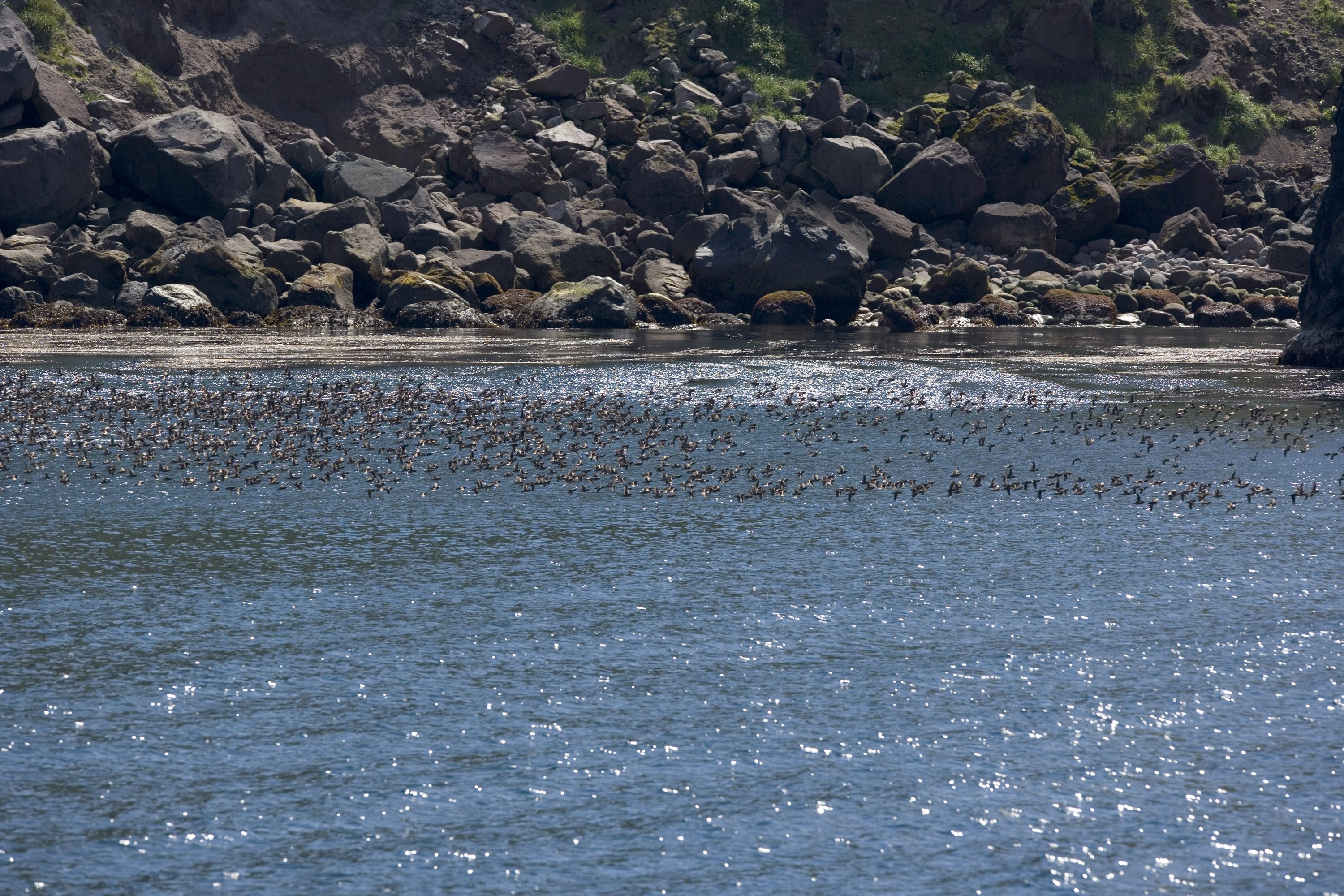 Auklet flock, Kasatochi Island